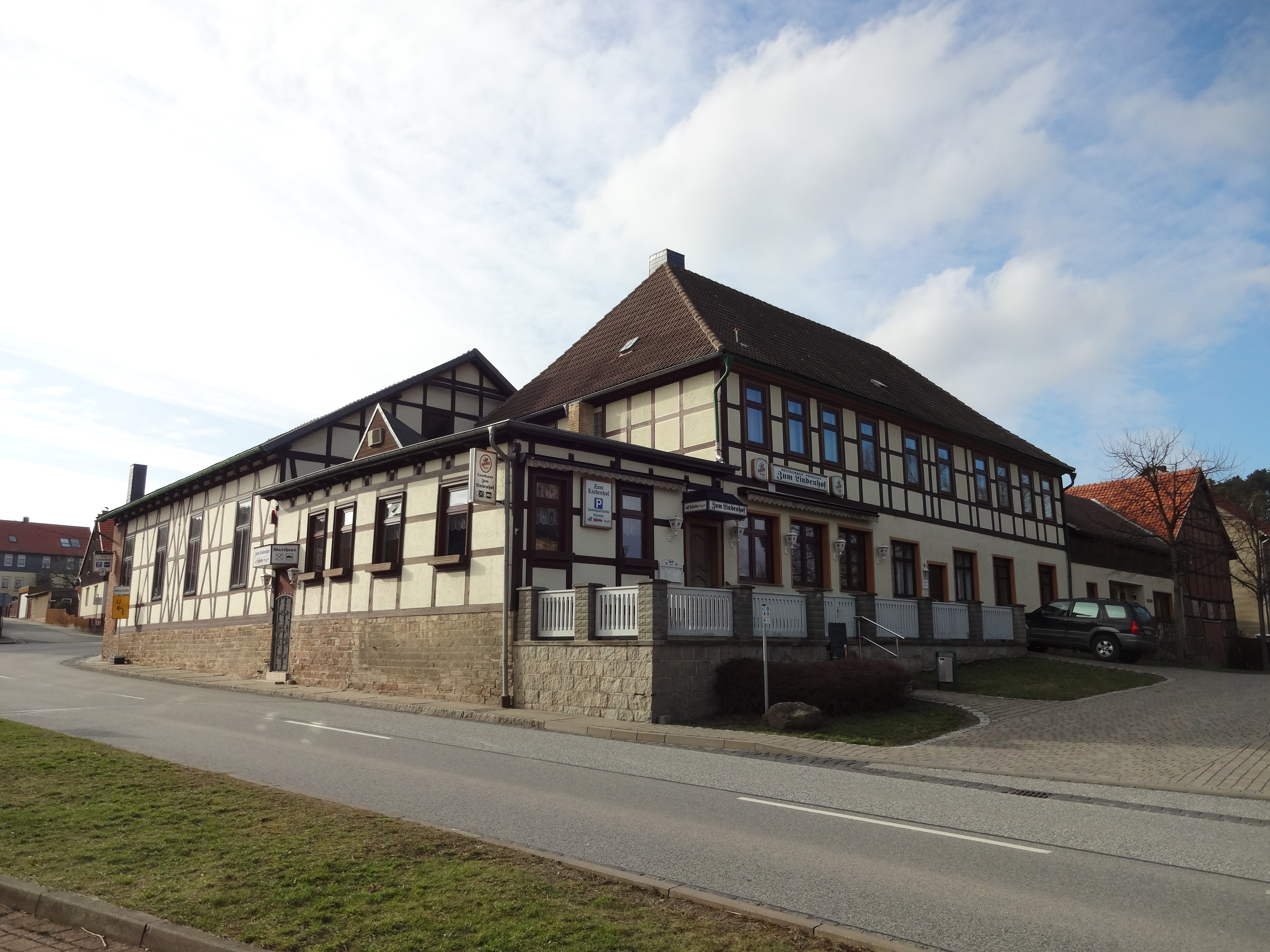 Denkmalgeschützter Gasthof in der Wernigeröder Straße 1 in Benzingerode (Ortsteil von Wernigerode)